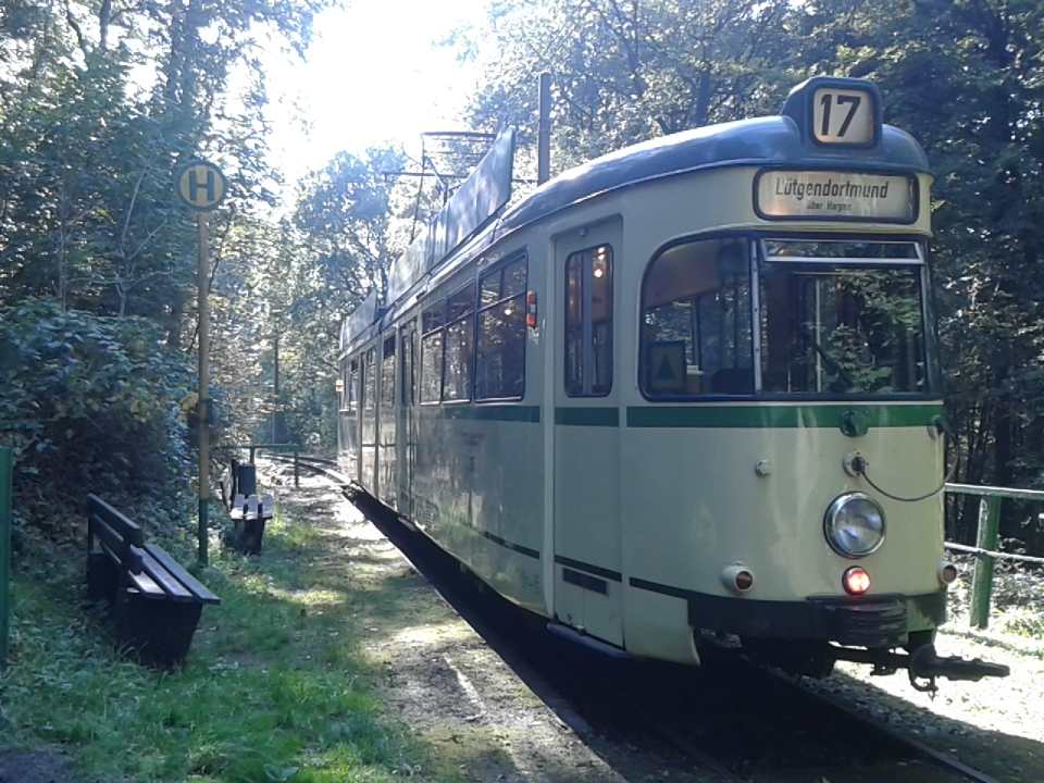 Der Bochumer Gtw 275 hält auf der Museumsstrecke der Bergischen Museumsbahnen an der Haltestelle Petrikshammer